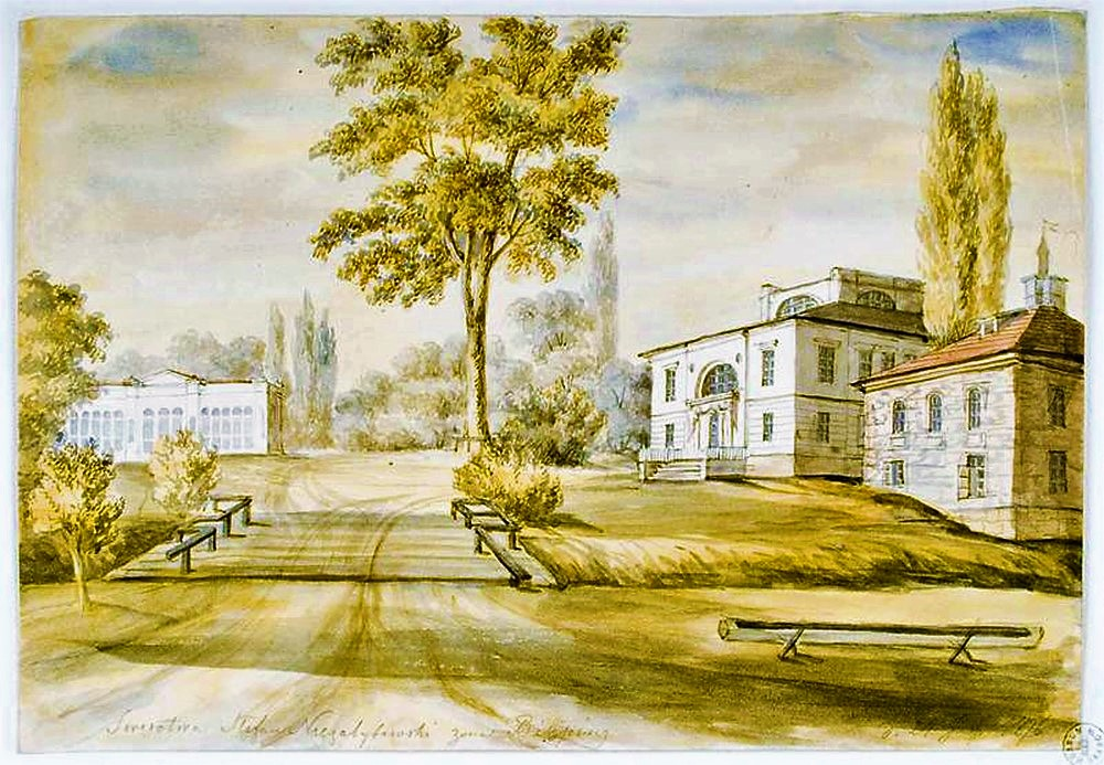 Беларуская (тарашкевіца): Сваротва (Svarotva), сядзіба Незабытоўскіх (Niezabytoŭski)